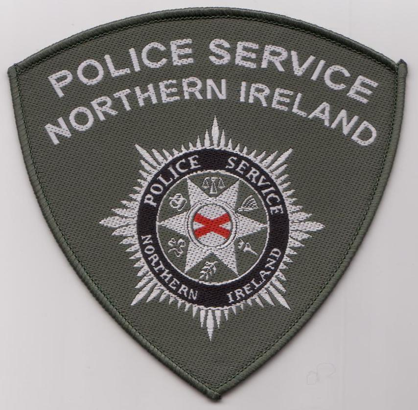 Northern Ireland police patch